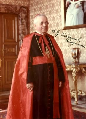 Card. Amleto Giovanni Cicognani